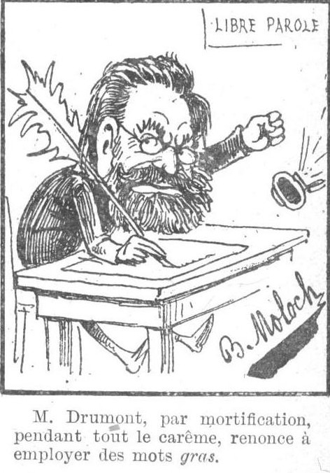 Extrait du Mois comique, page de caricatures du Monde moderne. 1898.